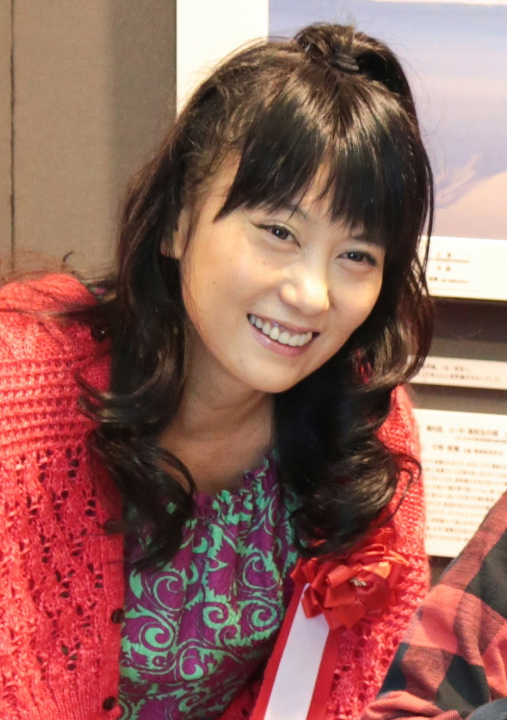 第6回 タムロン鉄道風景コンテスト オープニングセレモニー